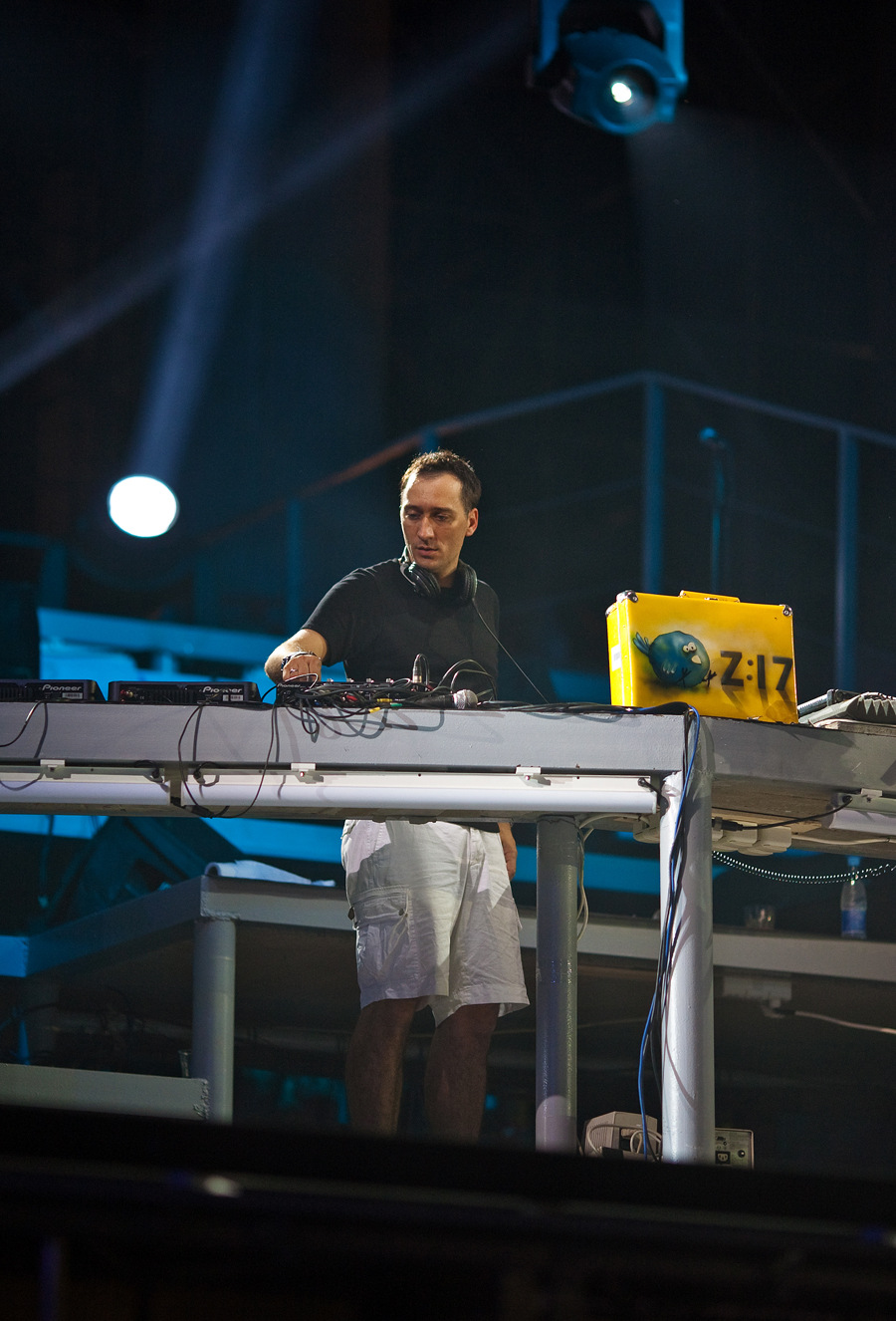 Paul van Dyk